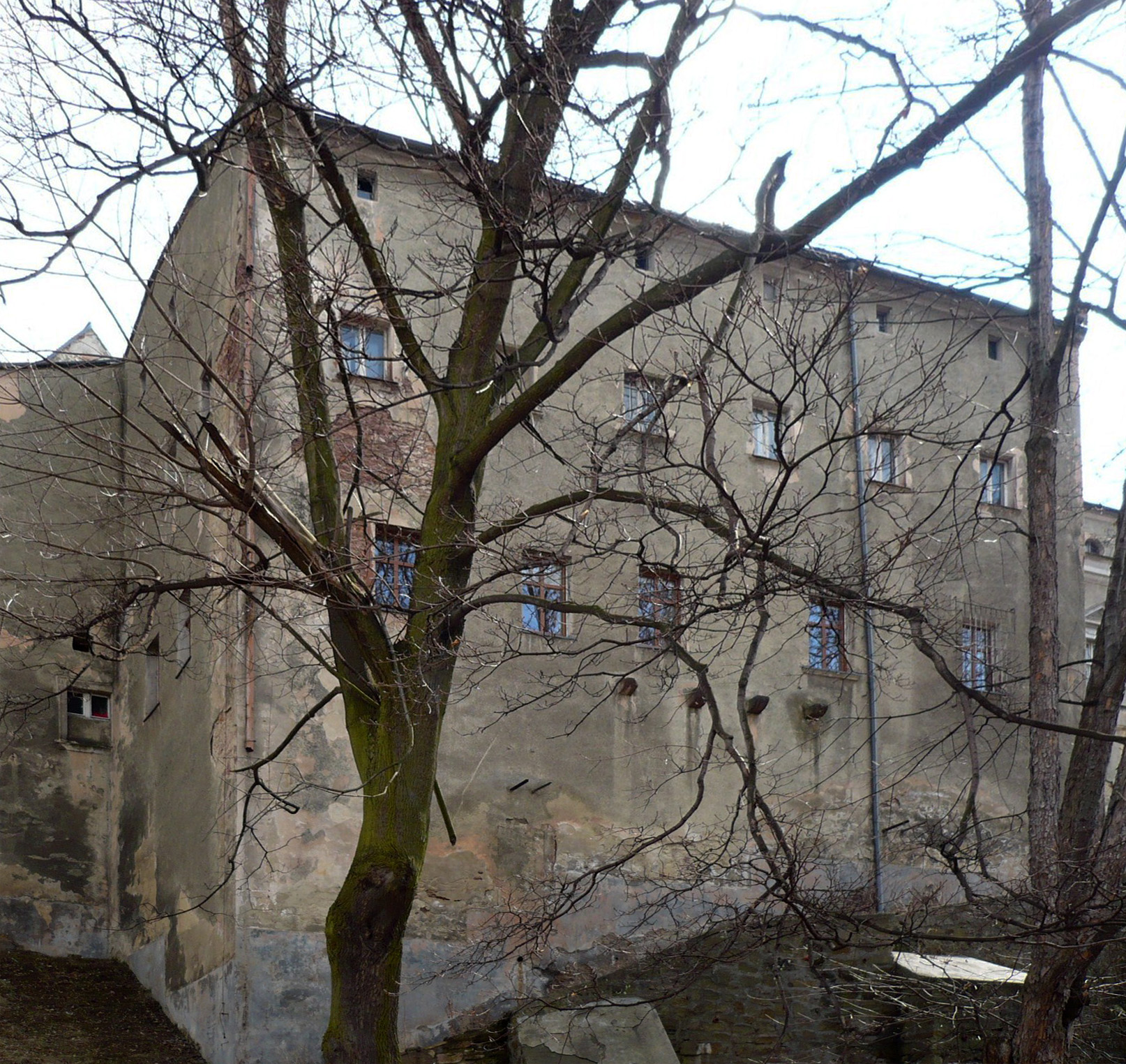 Nowa Ruda, ul. Piłsudskiego 2 - zamek Stillfriedów, obecnie biura, 1416, 1650, 1730 (zabytek nr A/935/1559 z 16.03.1966)